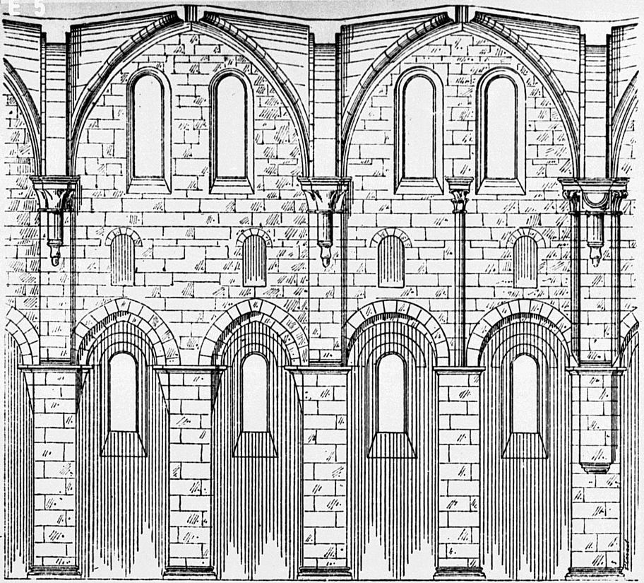 Aufriss des Langhauses der Zirsterzienser-Klosterkirche von Kloster Arnsburg